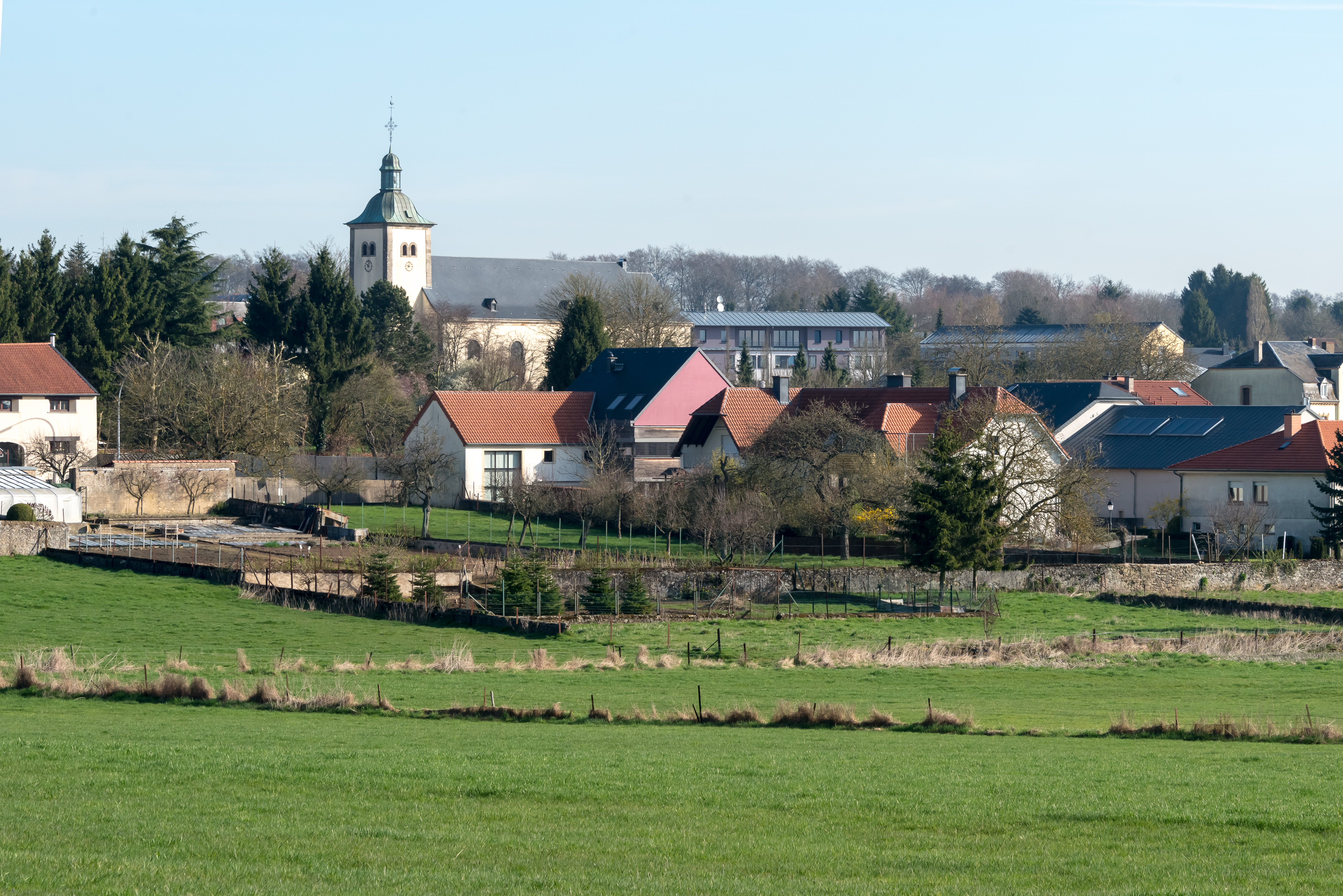 Vue op Sandweiler.